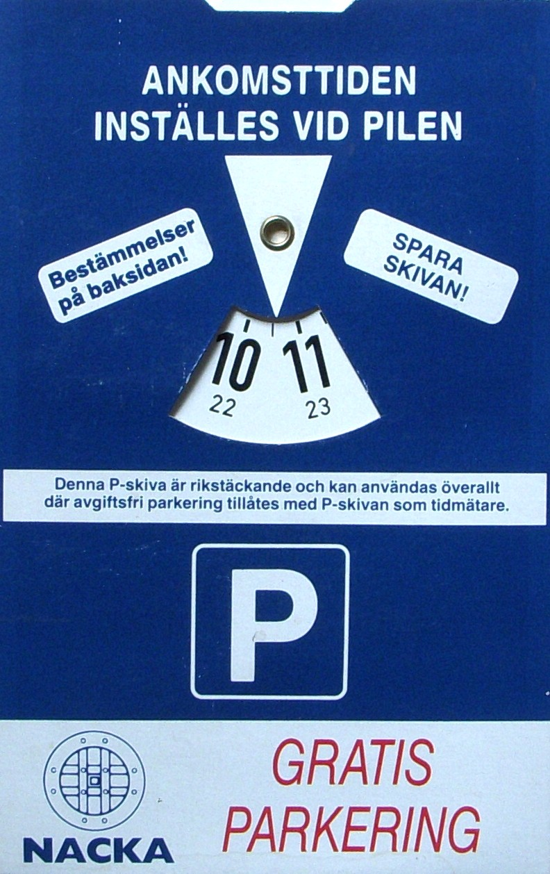 En svensk p-skiva